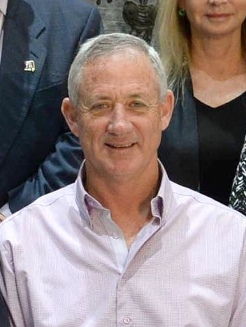 נשיא מדינת ישראל ראובן ריבלין במפגש לכינון הוועדה ל"אות הנשיא למתנדב", שנערך בבית הנשיא. למטה מימין לשמאל: יו"ר הוועדה המייעצת לאות הנשיא רא"ל (במיל') בני גנץ, נשיא המדינה, ממלא מקום יו"ר המועצה הלאומית להתנדבות ד"ר ברוך לוי. למעלה: מנכ"ל בית הנשיא הראל טובי וחברי הוועדה.